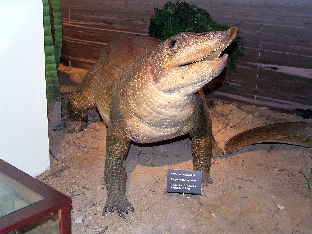 Aetozaur (stagolepsis olenkae), Muzeum Ewolucji PAN